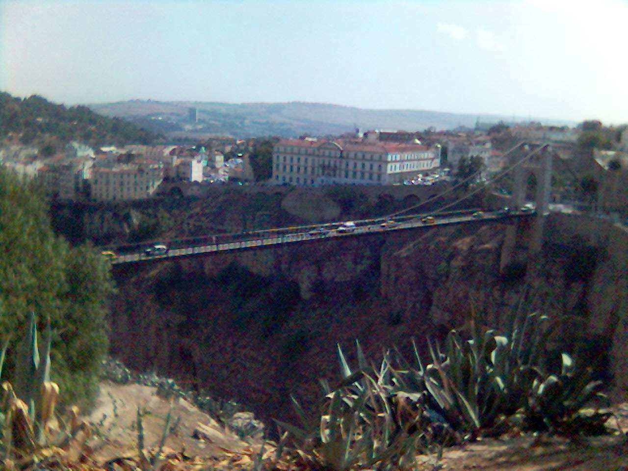 Le Pont Sidi M'Cid à Constantine, Algérie